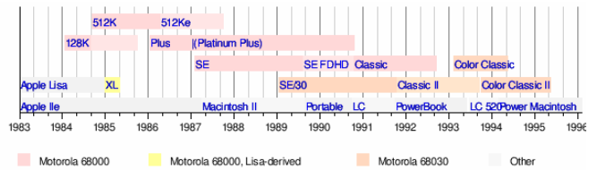 Macintosh konputagailuen ereduak denbora lerro batean Ingelesezko Wikipediatik hartuta.